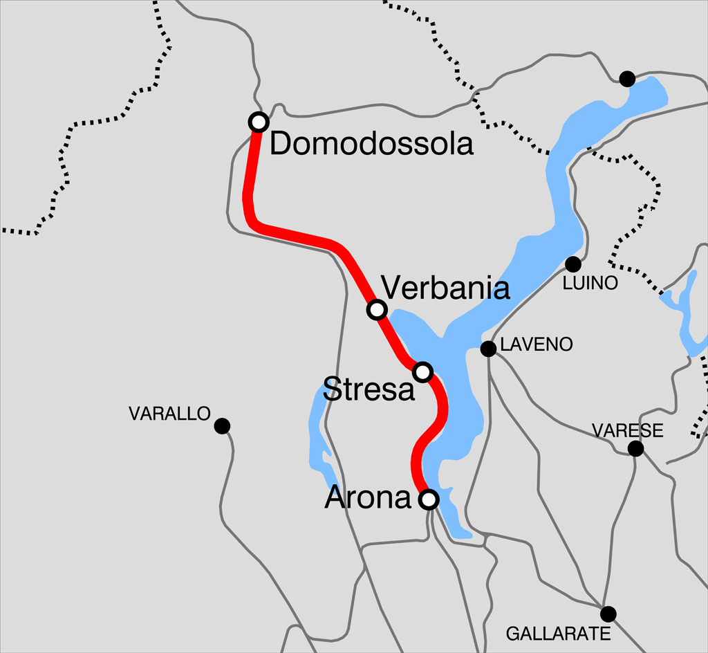 Mappa della ferrovia Arona-Domodossola